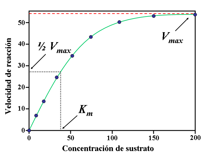 Representación gráfica de la velocidad de una reacción enzimática donde se puede observar los parámetros básicos de la ecuación de Michaelis-Menten.